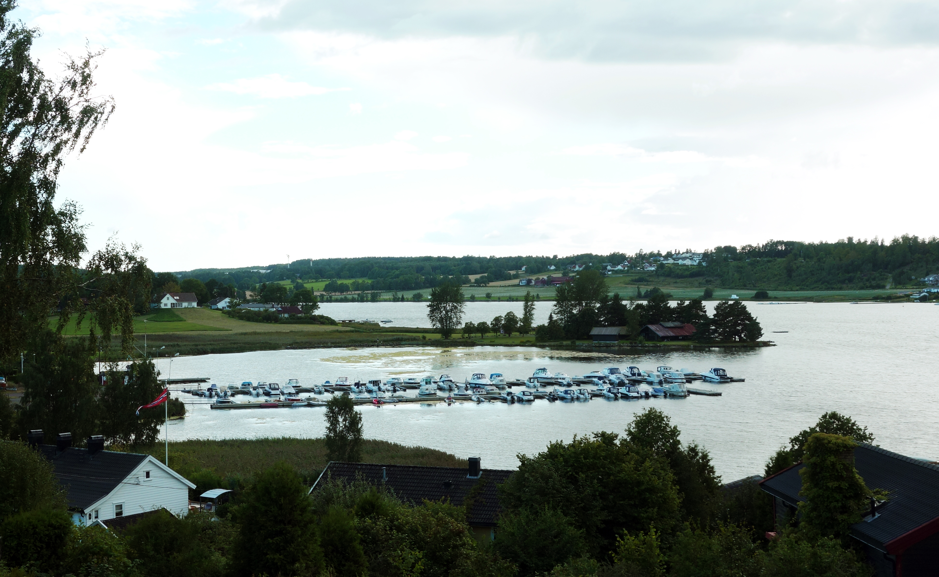 Munkholmen i Munkerekka på Nøtterøy